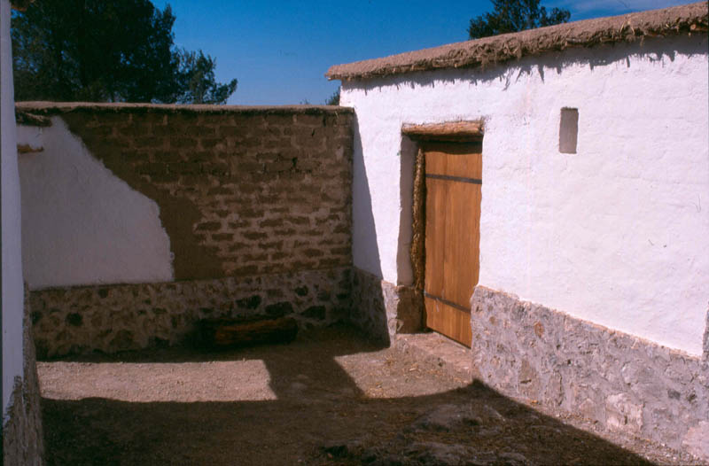 Pati i porta del magatzem.